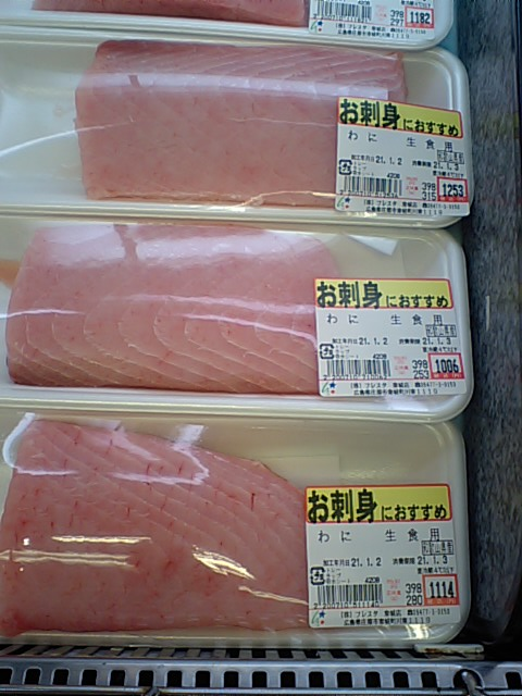 広島名物 ワニ肉 スーパーで売ってるところ